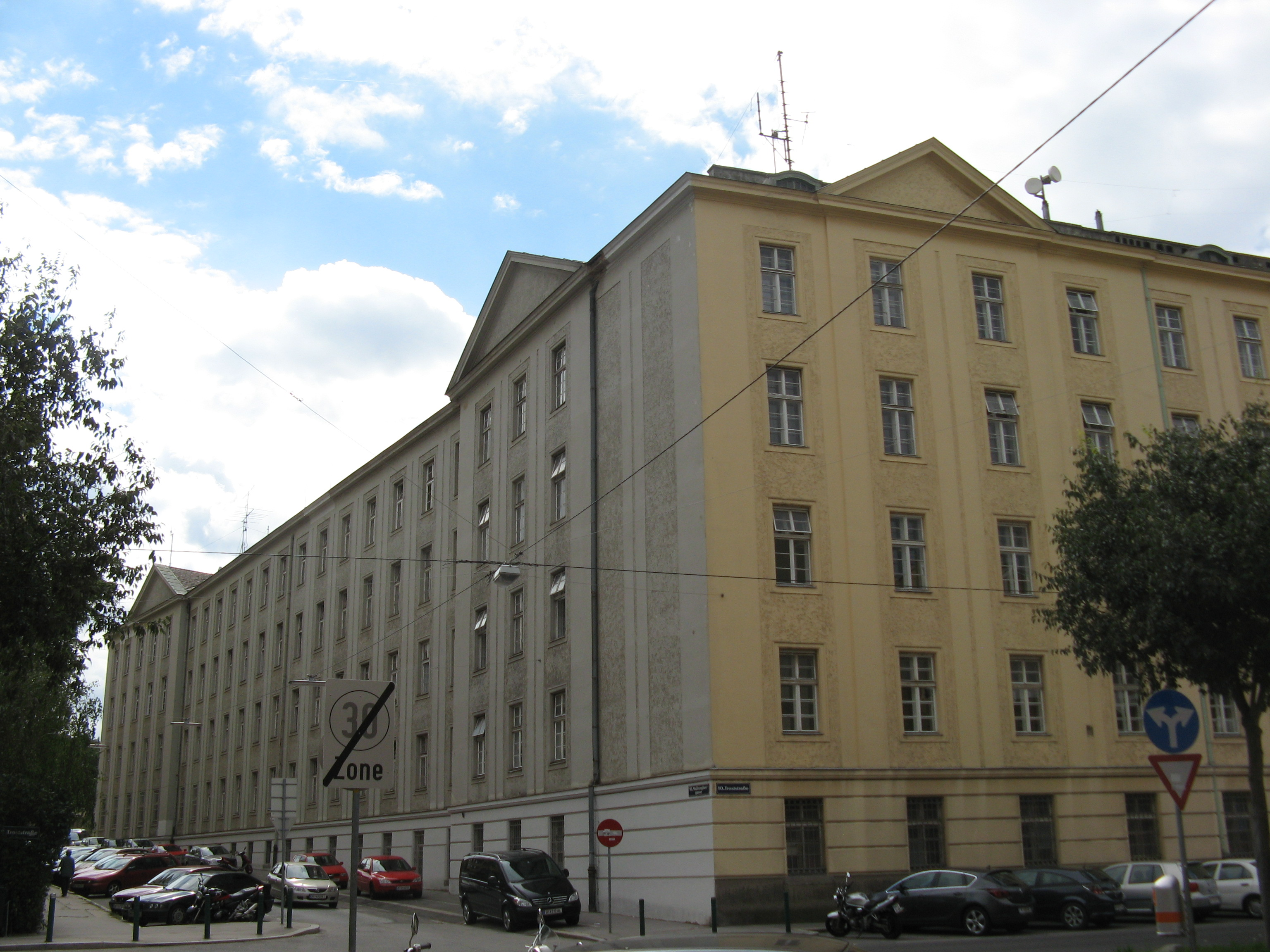 Starhemberg-Kaserne (1911-12), Troststraße 105, Wien-Favoriten